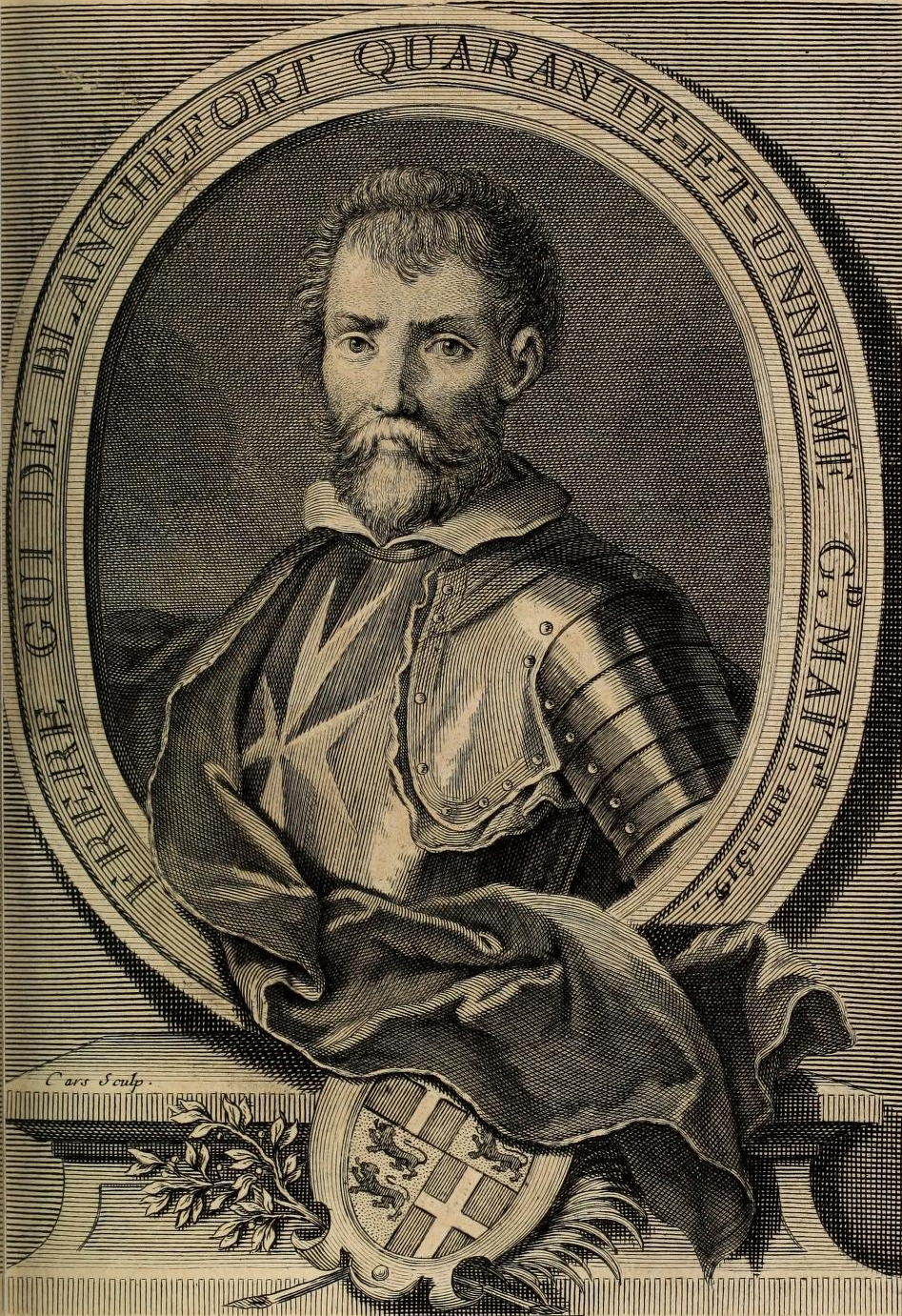 grand maître de l'ordre de Saint-Jean de Jérusalem